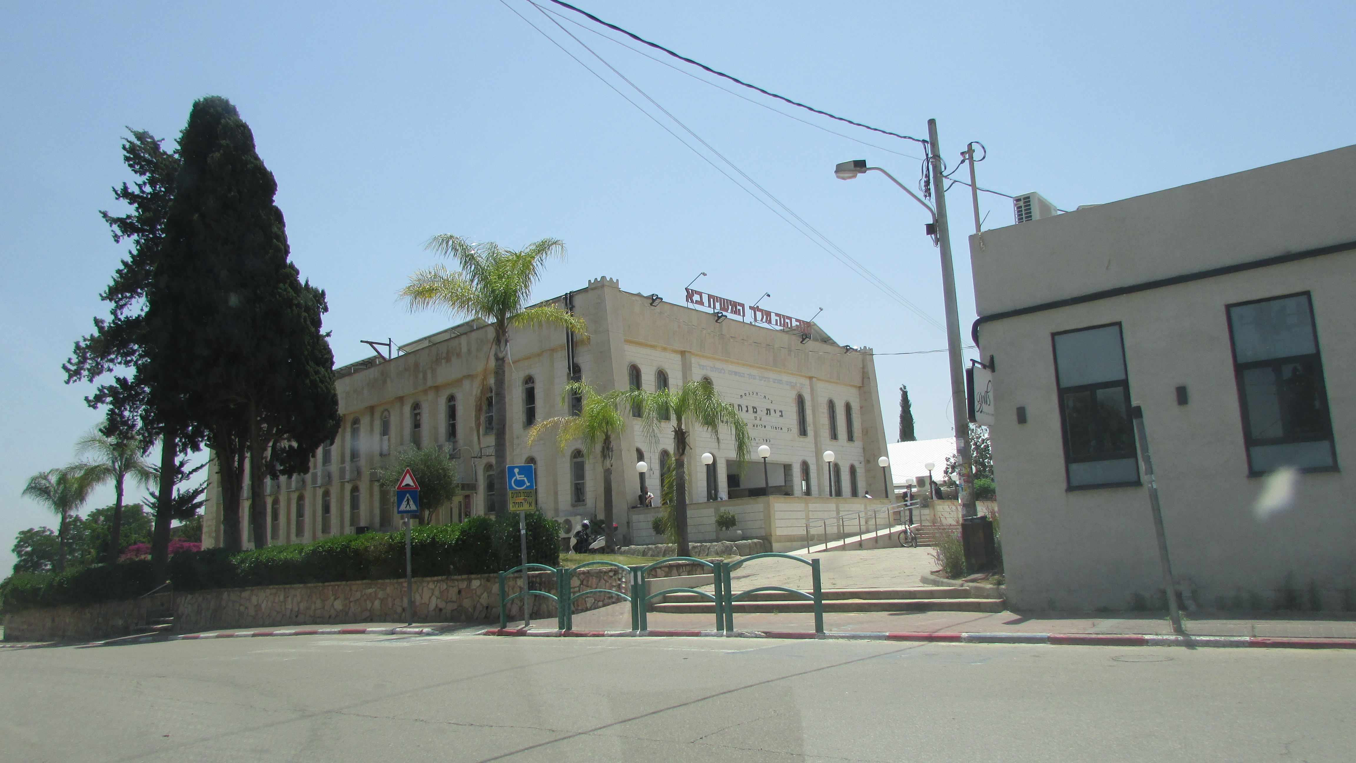 Kfar Chabad